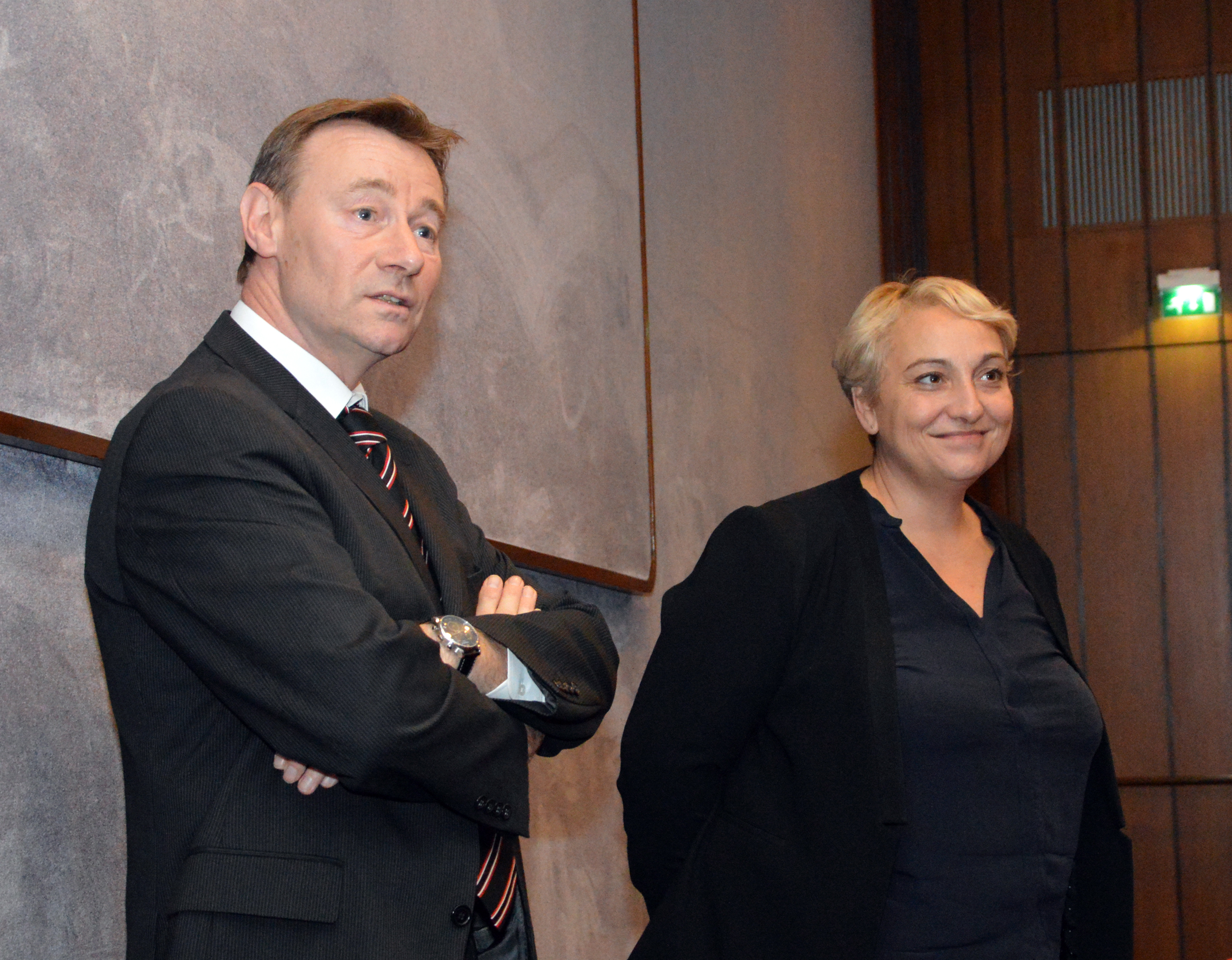 Pascal Demarthe et Pascale Boistard lors d'un accueil de visiteurs de la 1ère circonscription de la Somme